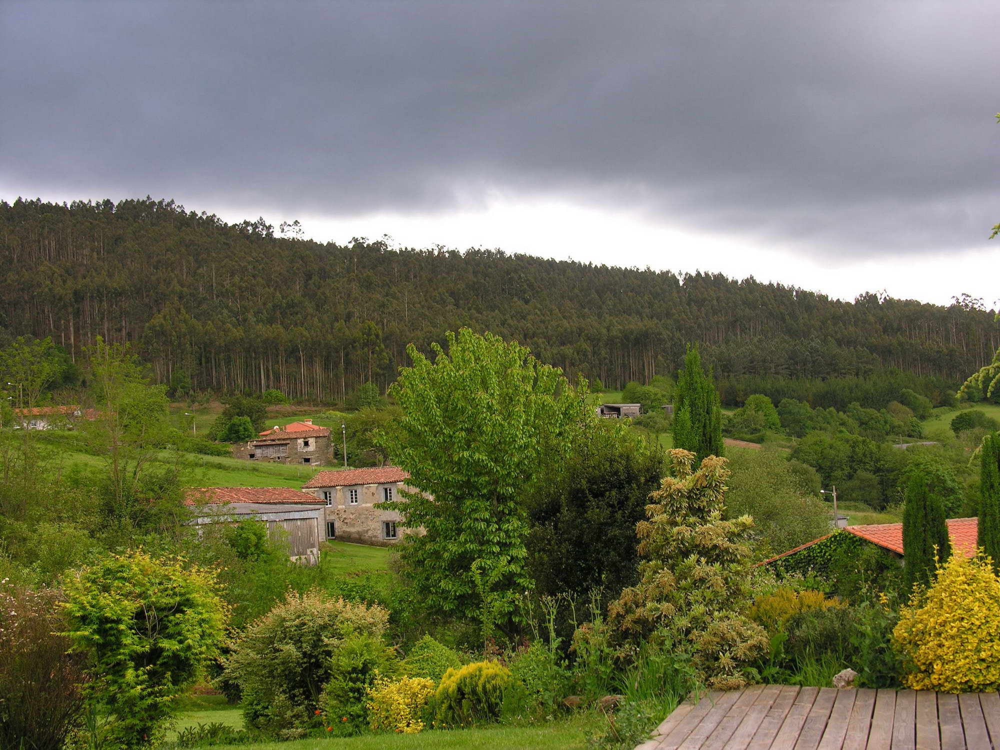 Mandaio, Cesuras, Galicia Publish by= Luis Miguel Bugallo Sánchez. Self made